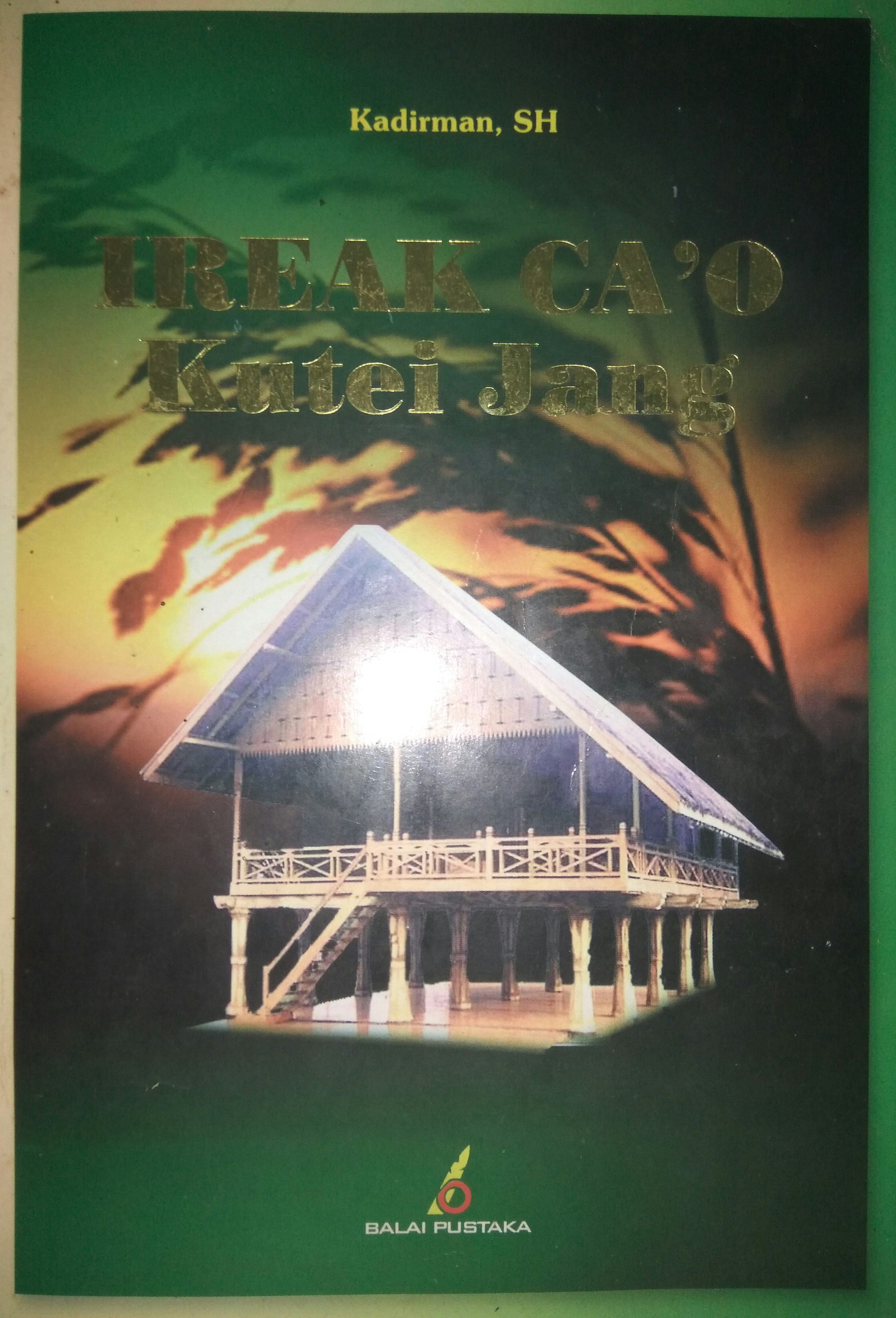 La sola libro en la raĝanga lingvo